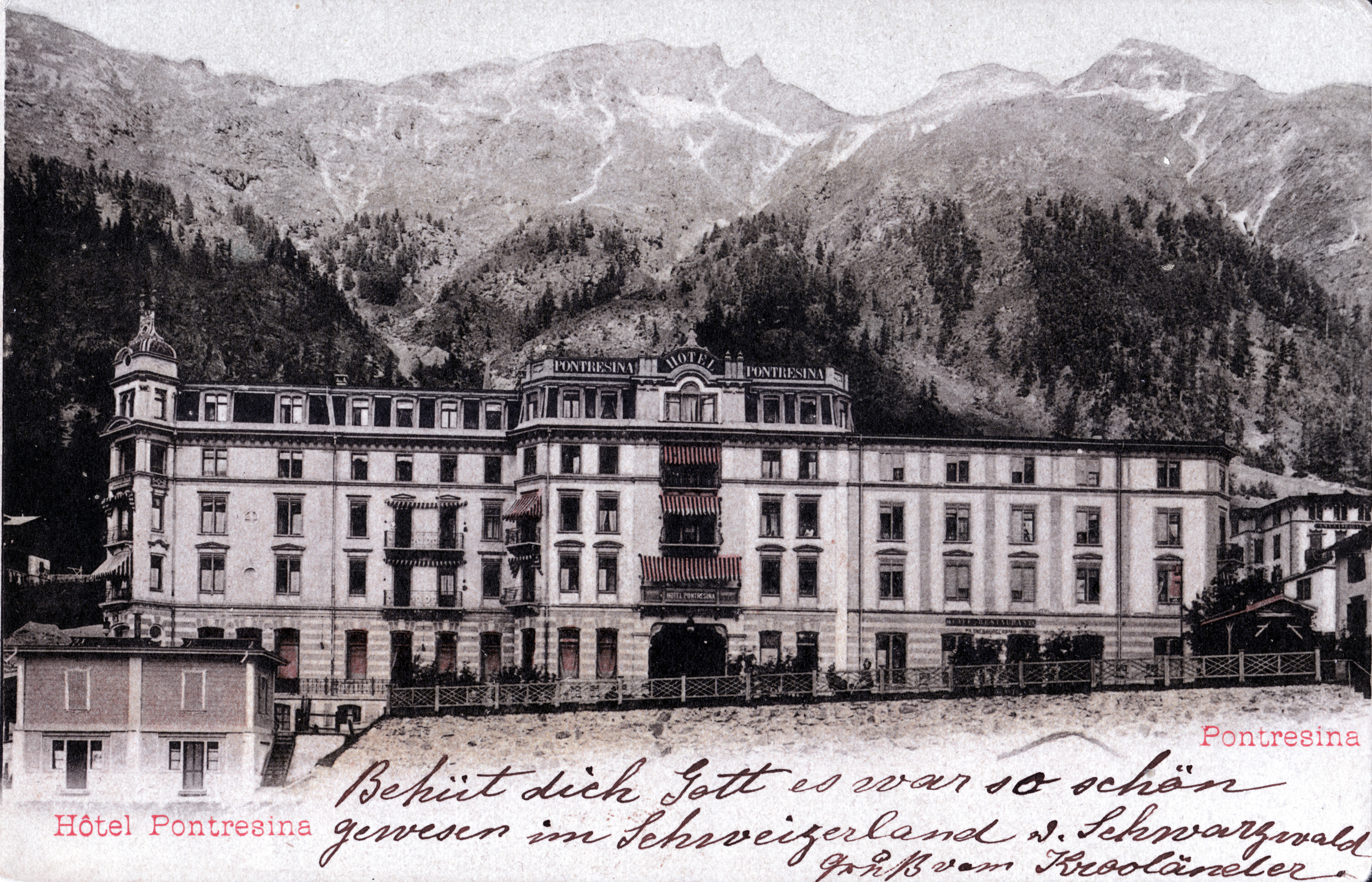 Pontresina - Hotel Pontresina um 1900